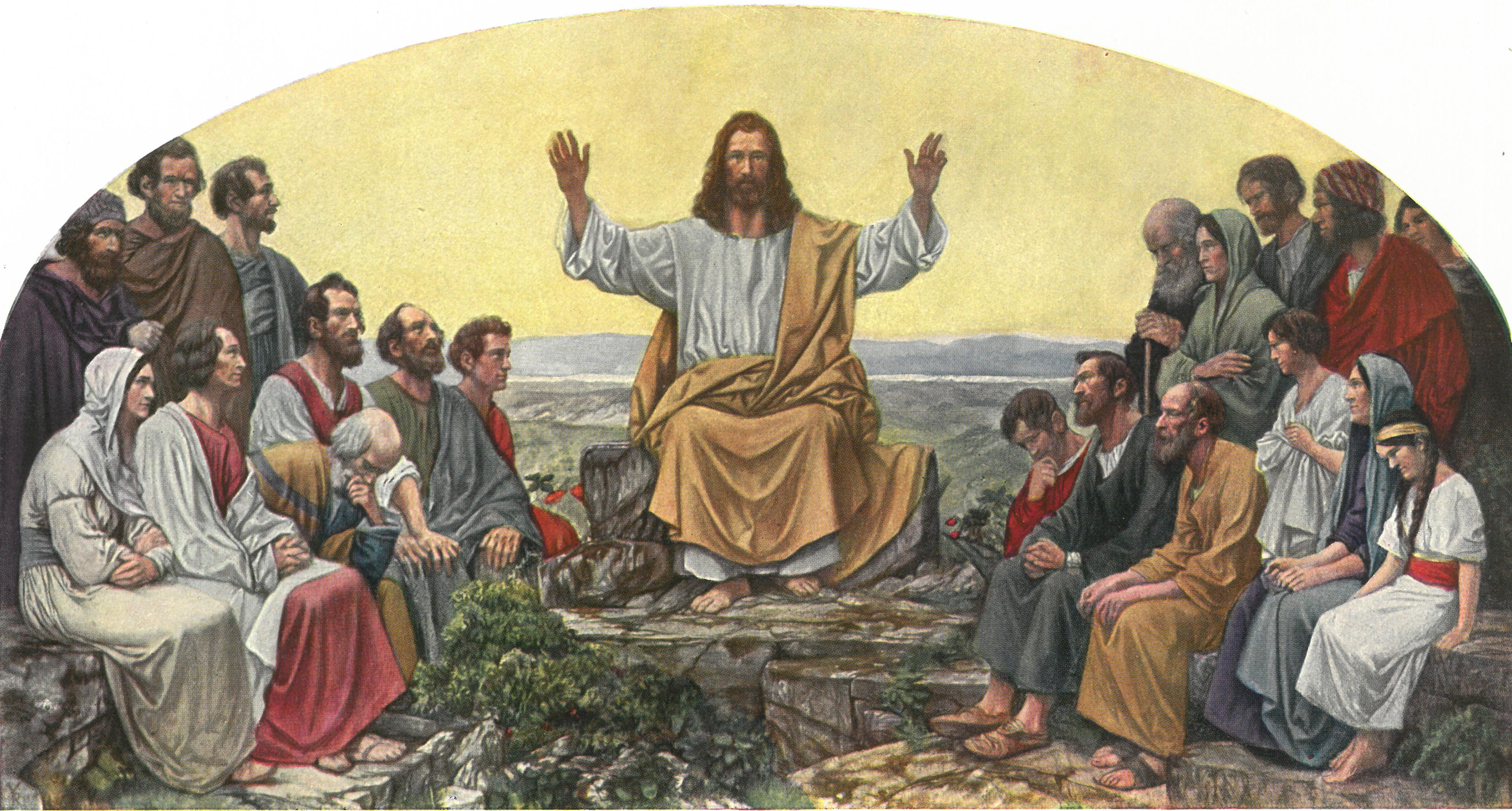 Bergpredigt